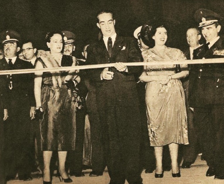 El Presidente de la Junta de Gobierno, Germán Suárez Flamerich, durante una inauguración.